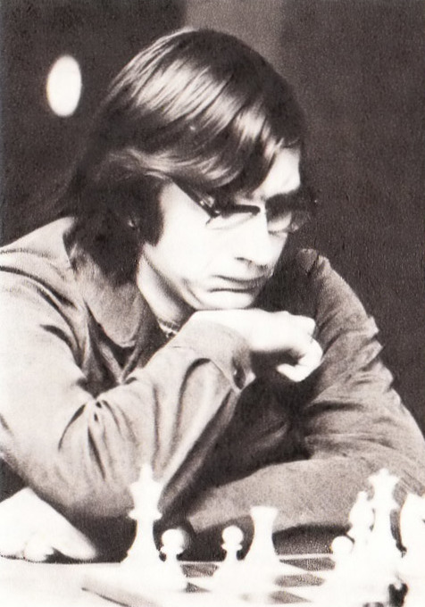 Krzysztof Pytel (ur. 15 maja 1945 w Chełmie) – polski szachista, trener i dziennikarz szachowy, reprezentant Francji od 1989, mistrz międzynarodowy od 1975 roku.